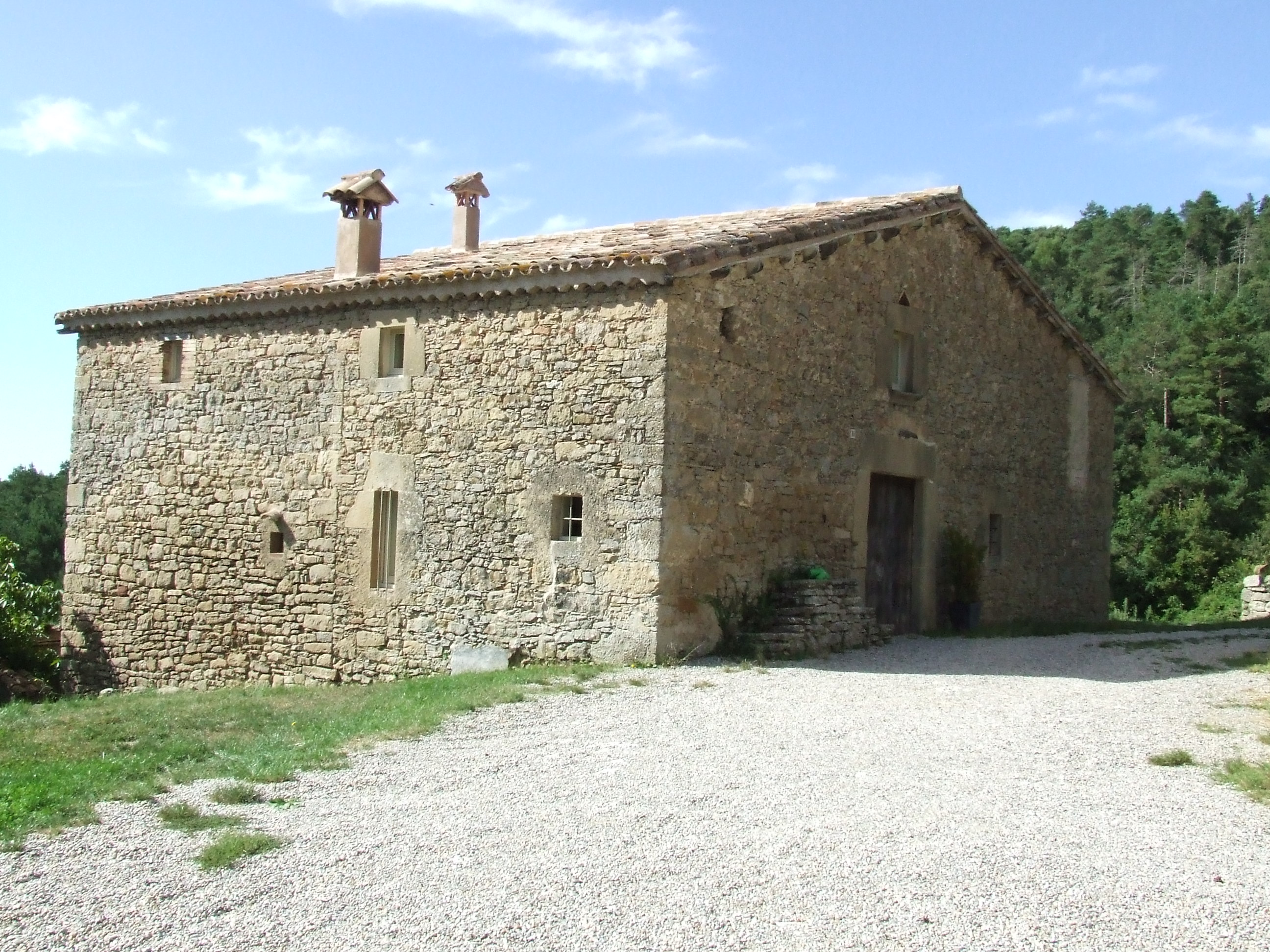 La Roca (Castellcir, Moianès)